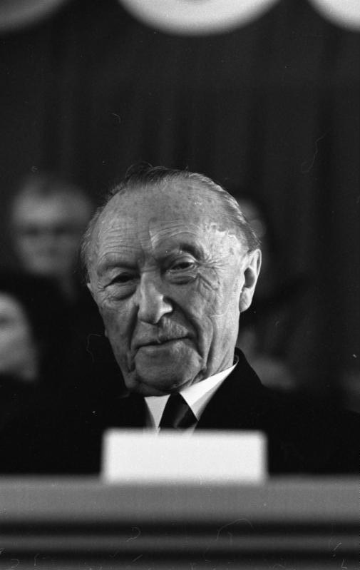 CDU-Bundesparteitag in Düsseldorf Konrad Adenauer